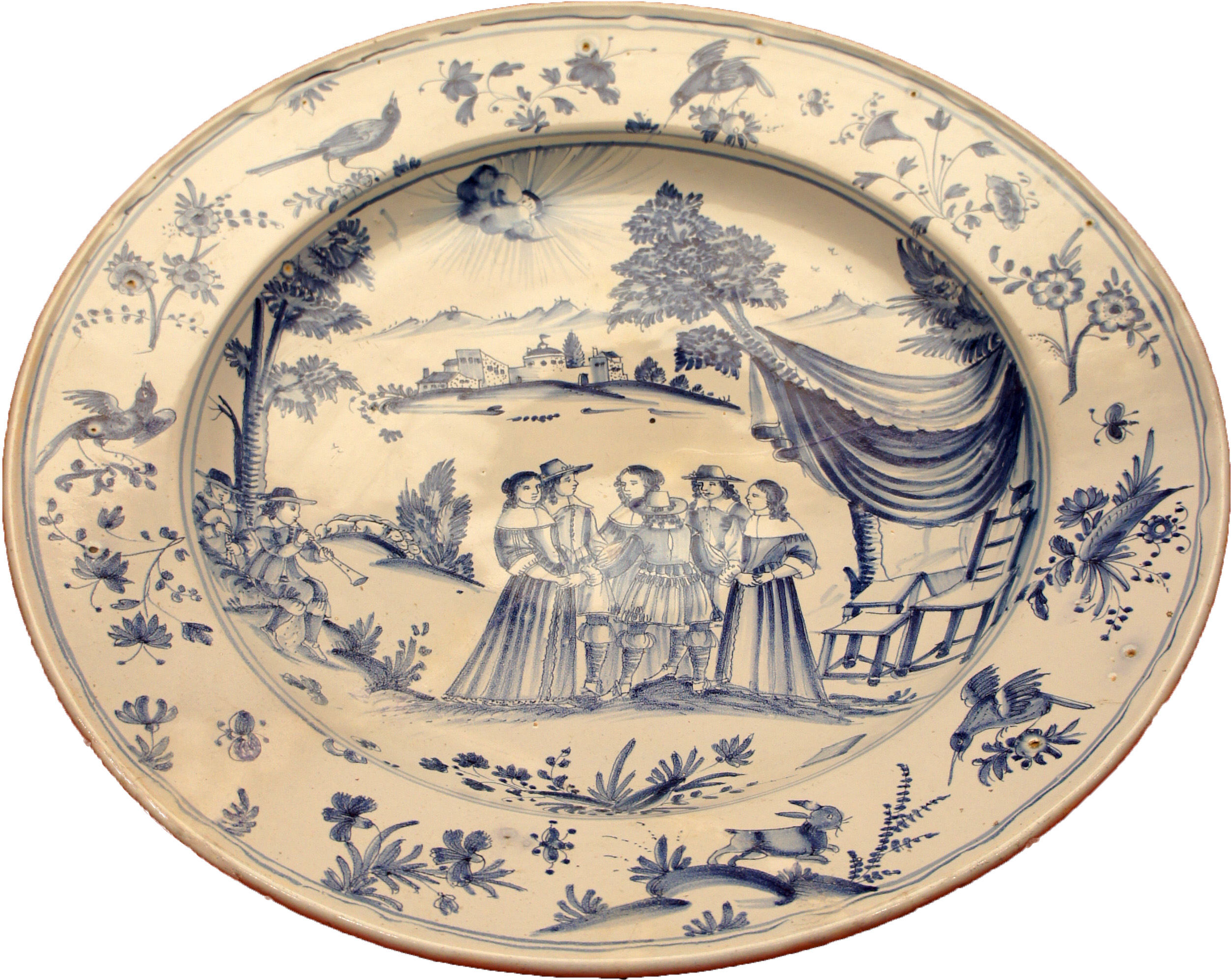 Au Musée des Beaux-Arts de Reims.